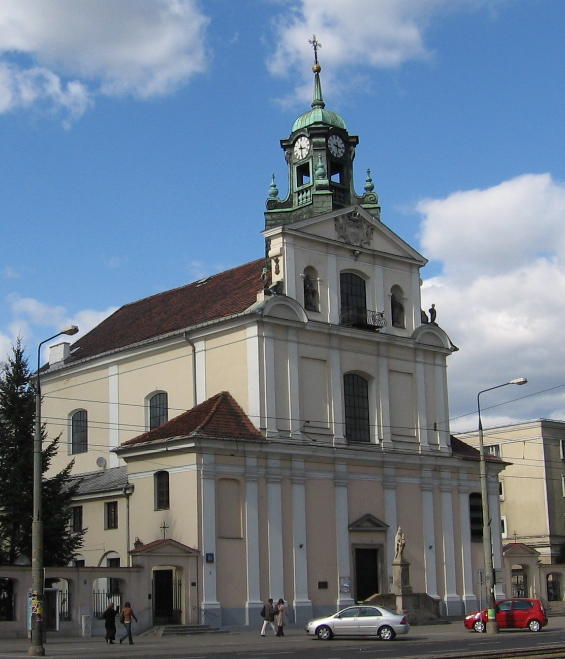 Kościół pw. Narodzenia NMP ul. Leszno w Warszawie